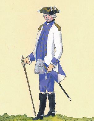 Przyboczny adiutant koronny (Fligeladiutant króla) (Adiutant przyboczny króla